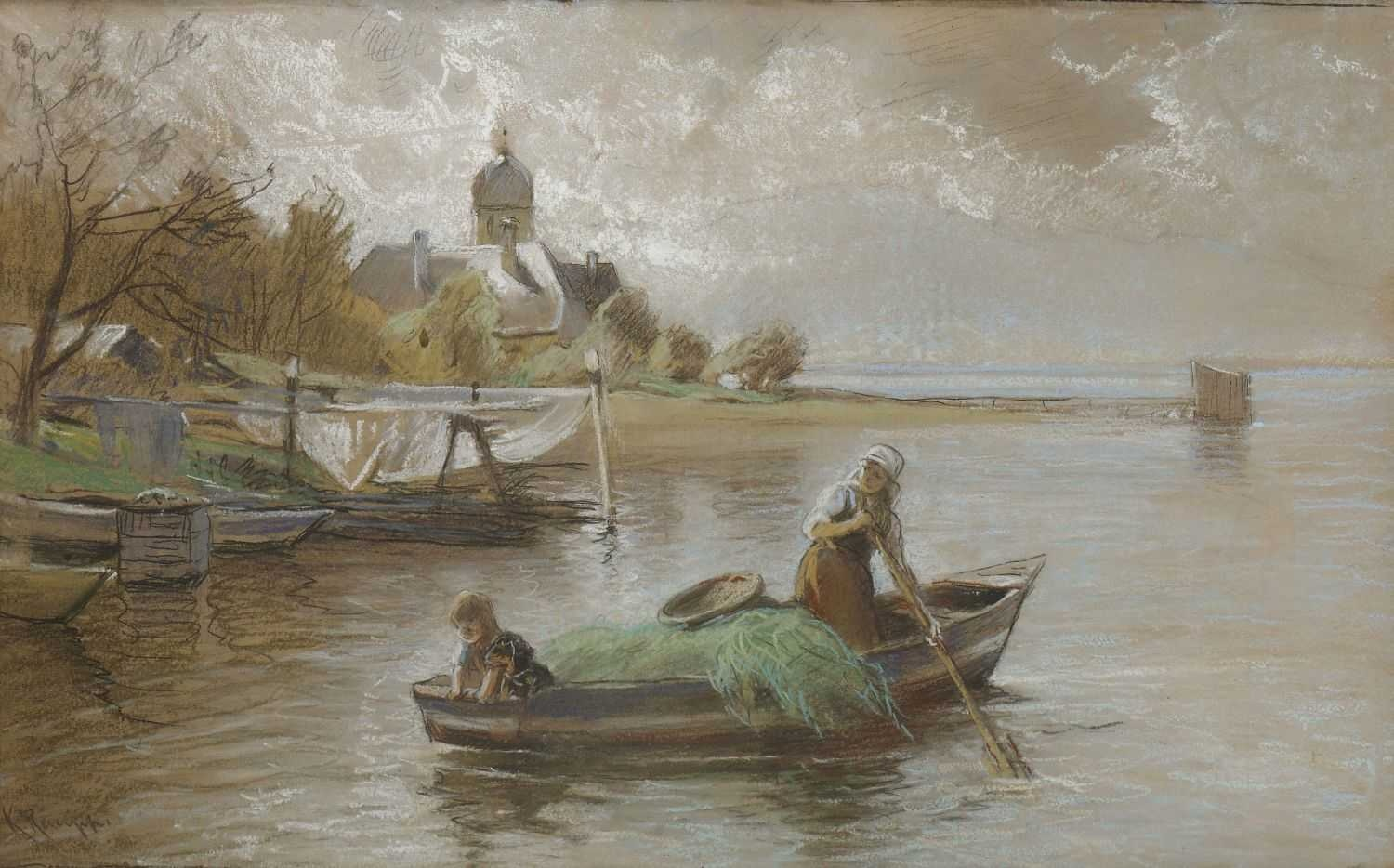 Am Ufer der Fraueninsel. Pastell, 43,5 x 70 cm